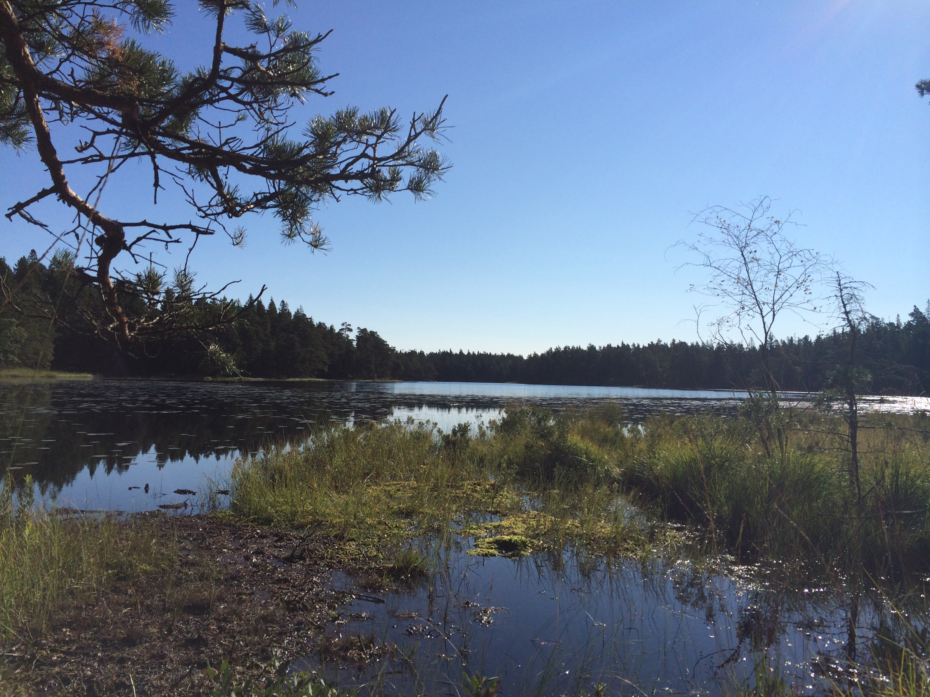 Gårdsjön, Hunneberg